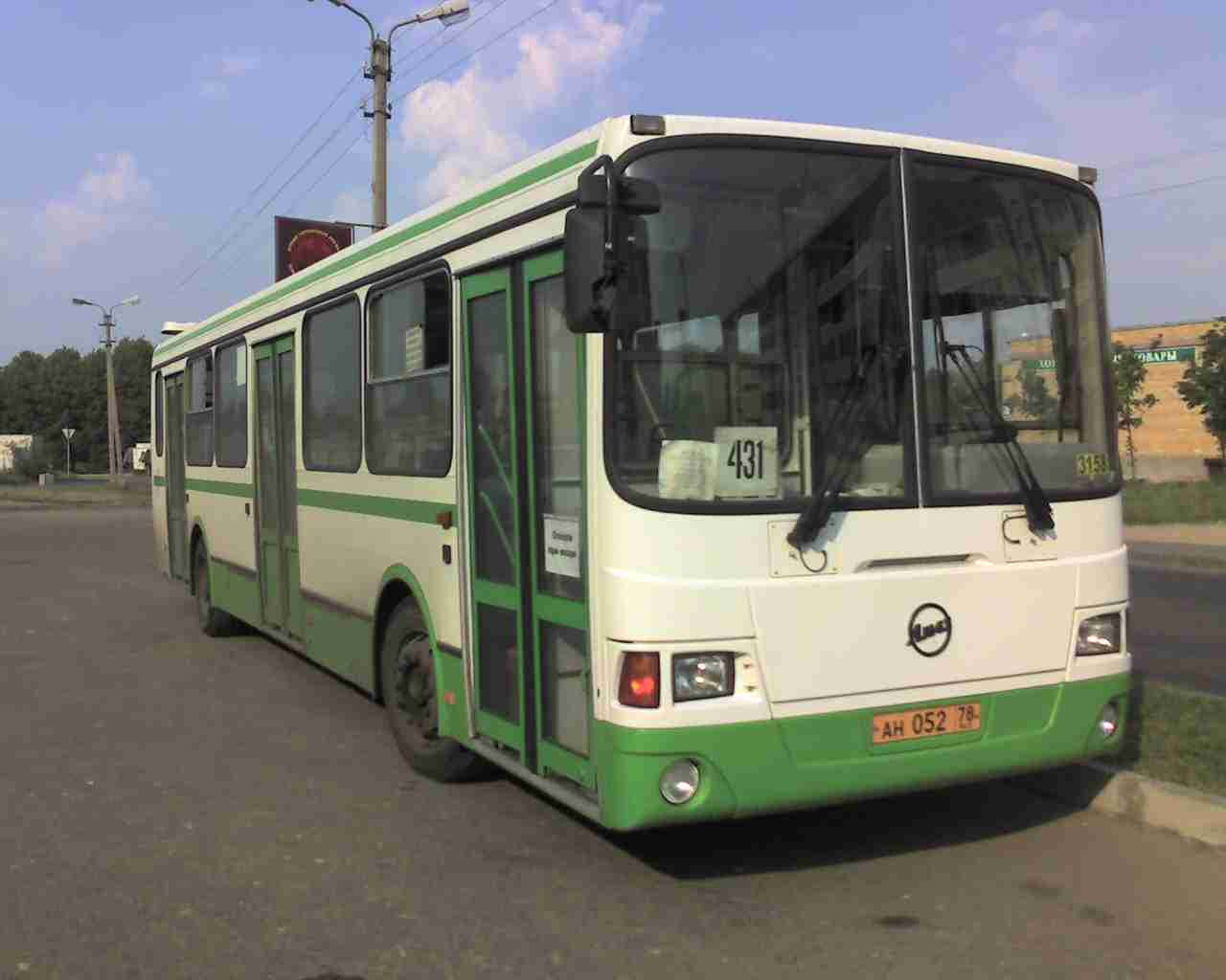 Автобус ЛиАЗ-5256.26 маршрута №431 в Гатчине